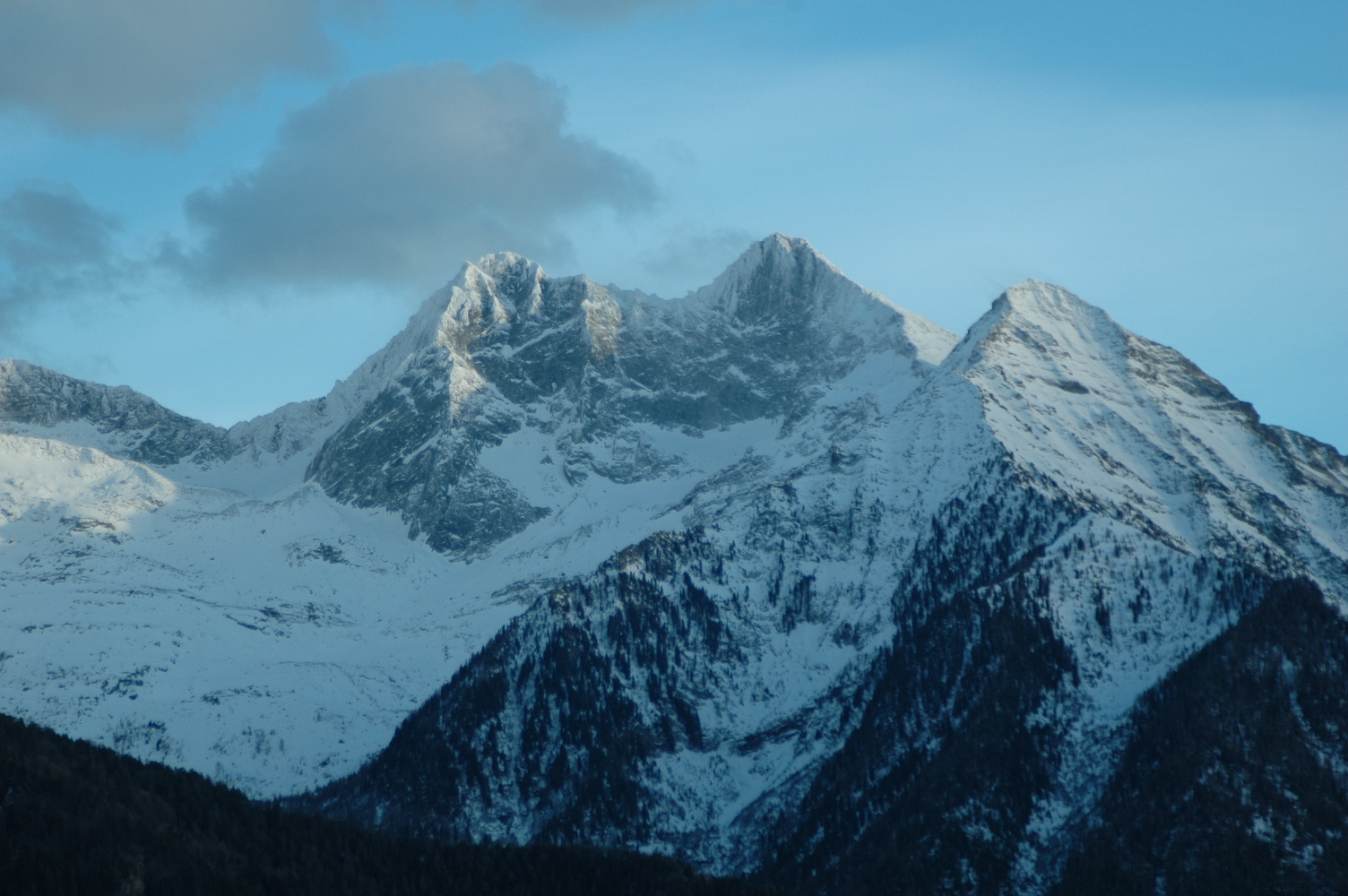 Becche Torche innevate. A sinistra la Becca di Vlou e a destra la Becca Torché. All'estrema destra la Becca Mortens.